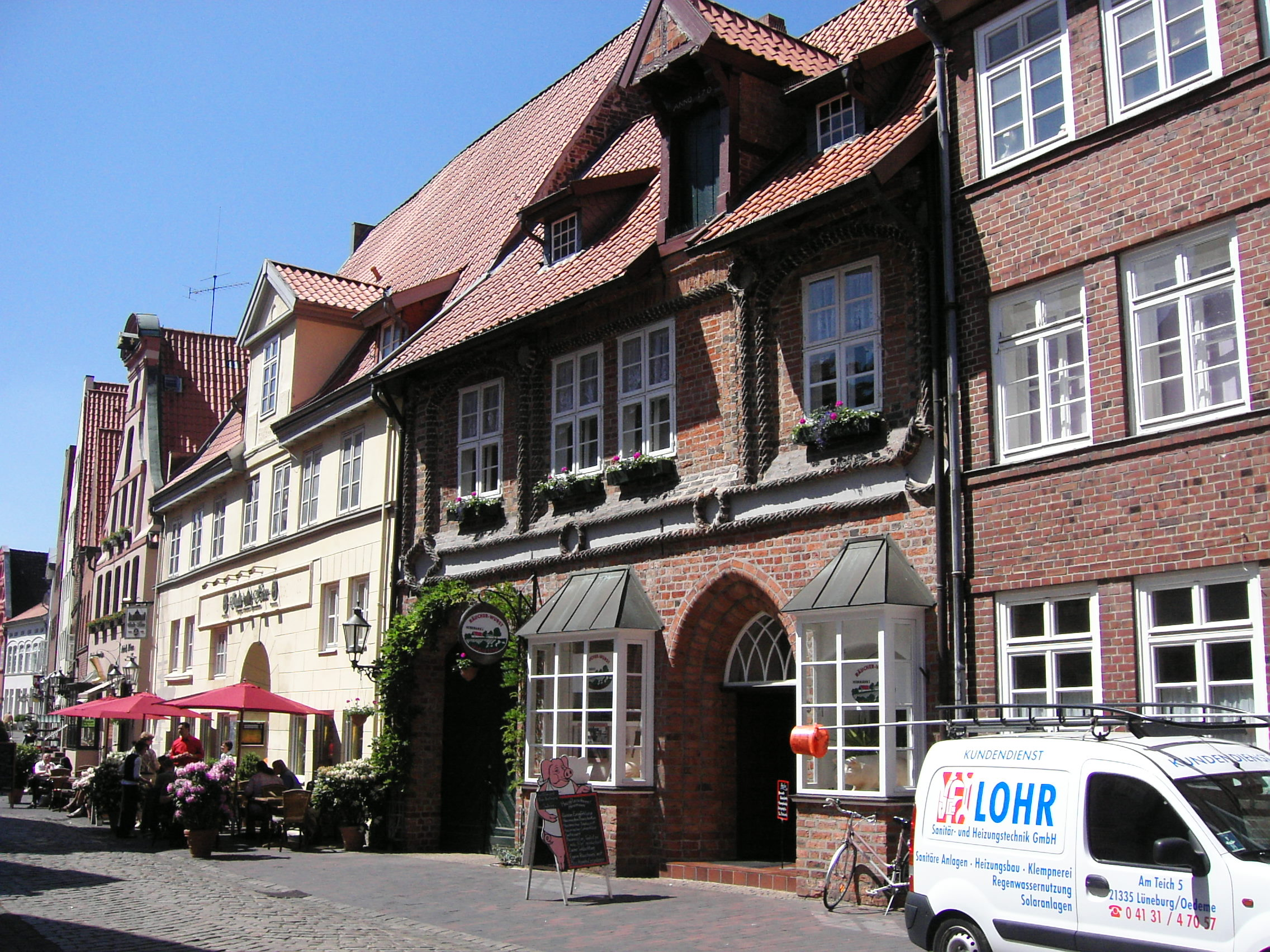 Lüneburg, Altstadt